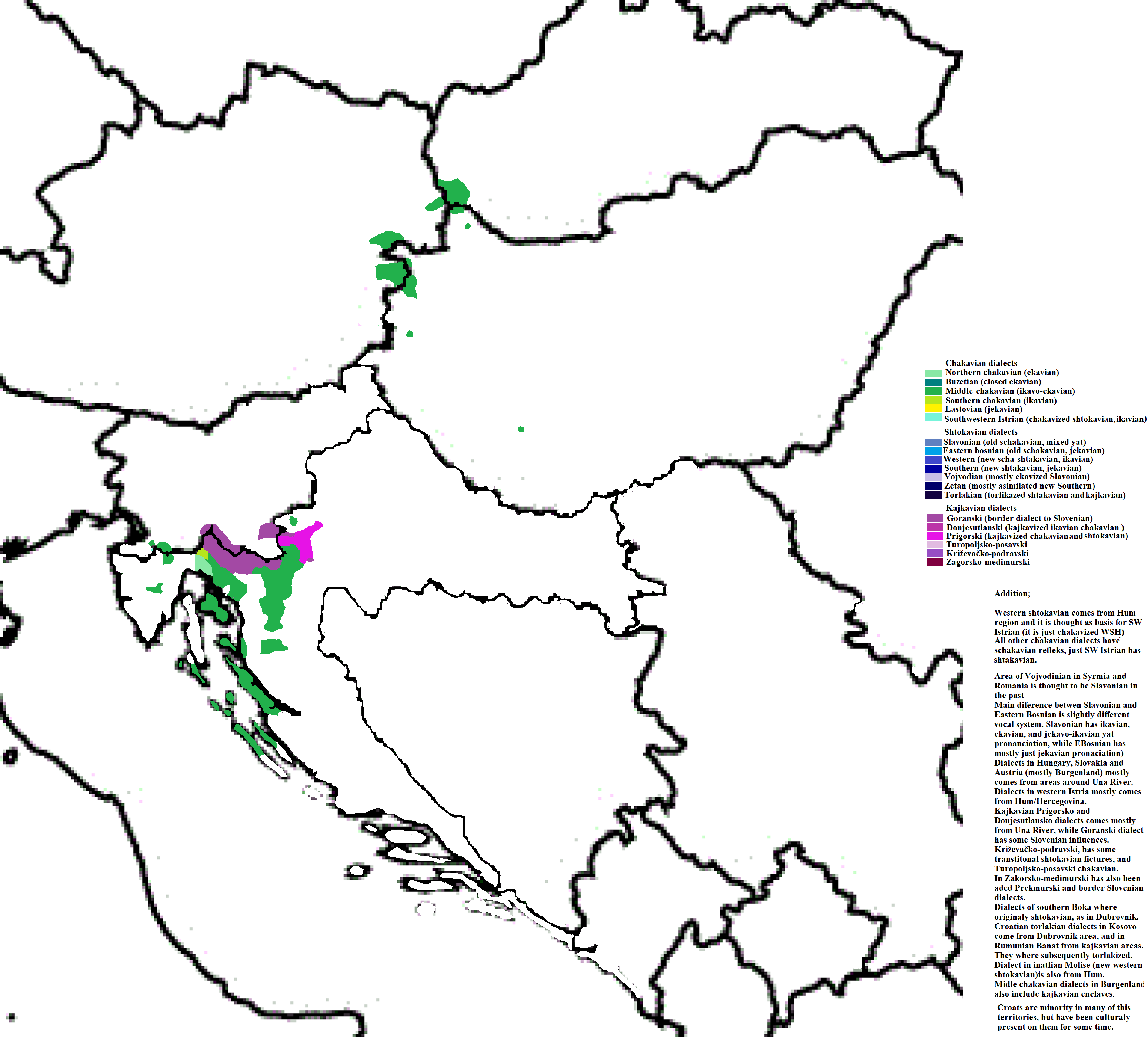 Srednječakavski i povezani dijalekti; prigorski je srednječakavsko-kajkavski (turopoljsko posavski) hibrid a goranski sadržava neke srednječakavske izoglose